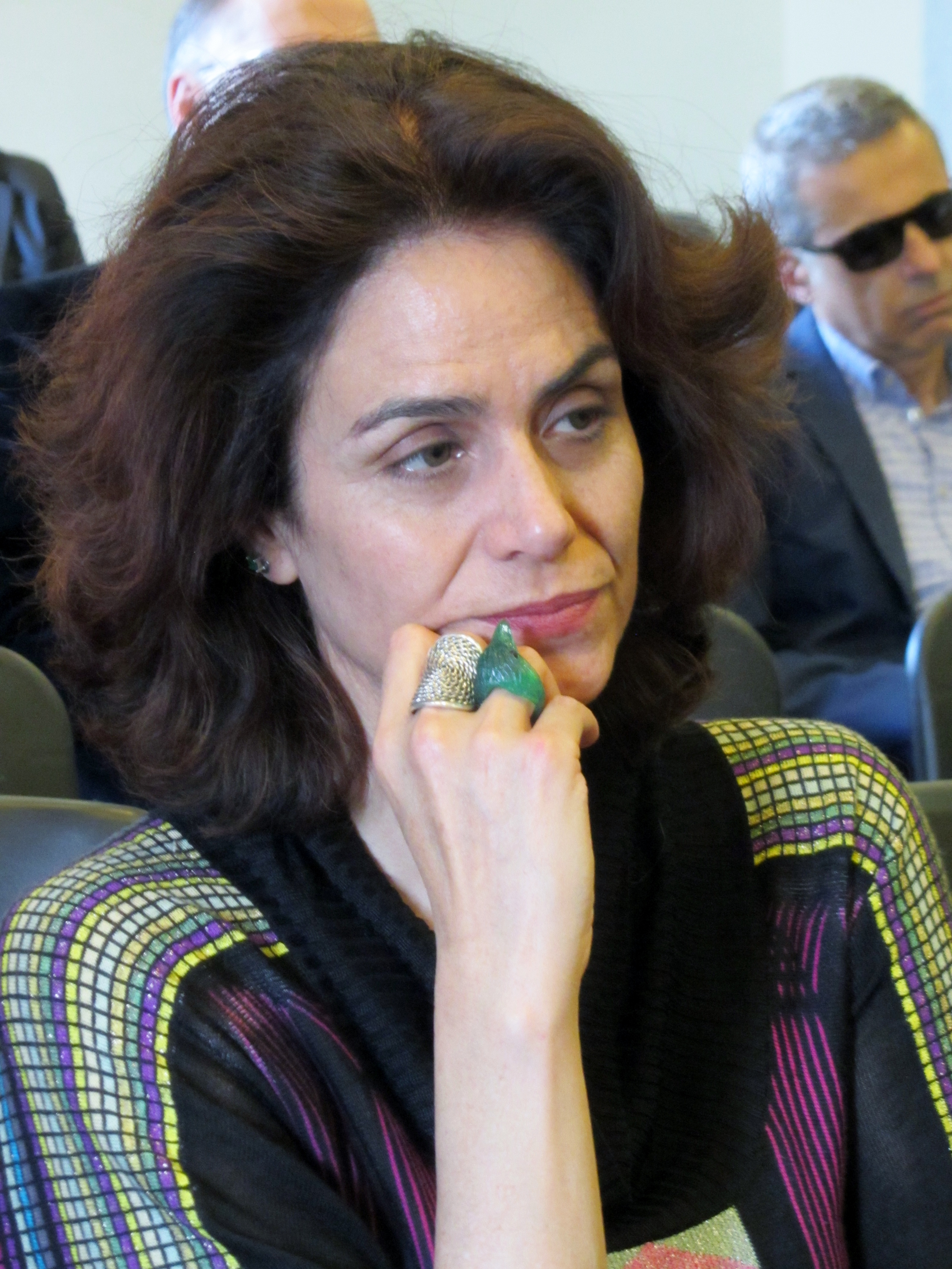 La escritora ecuatoriana Gabriela Alemán en la Feria Internacional del Libro de Santiago 2015